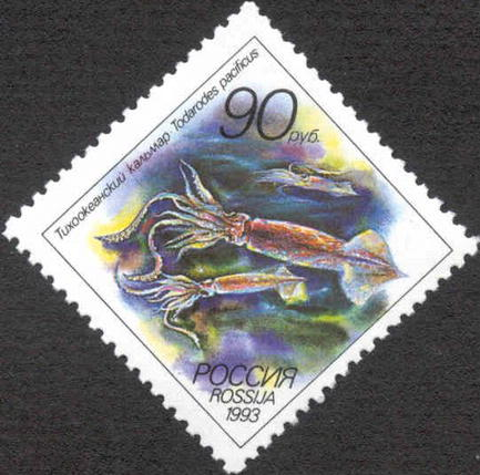 Почтовая марка России